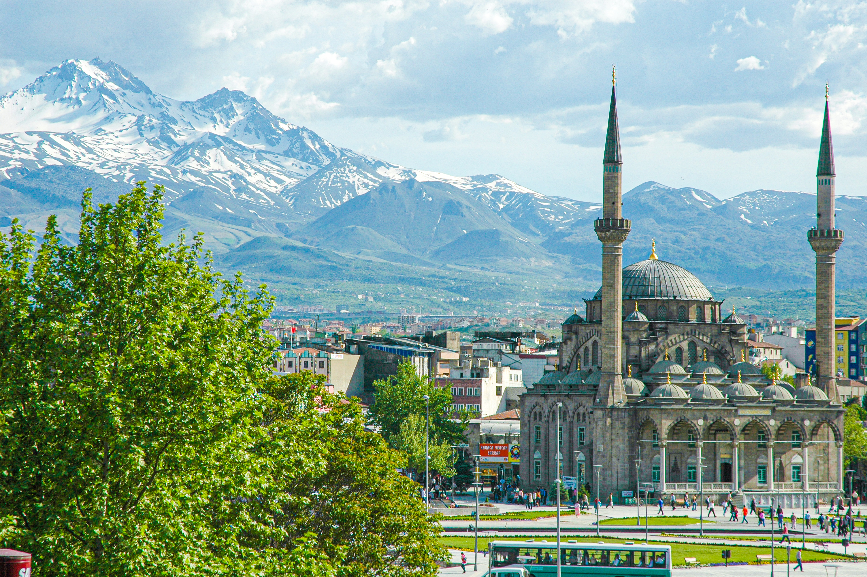 Bu fotoğraf Hasan Sami Bolak tarafından çekildi.